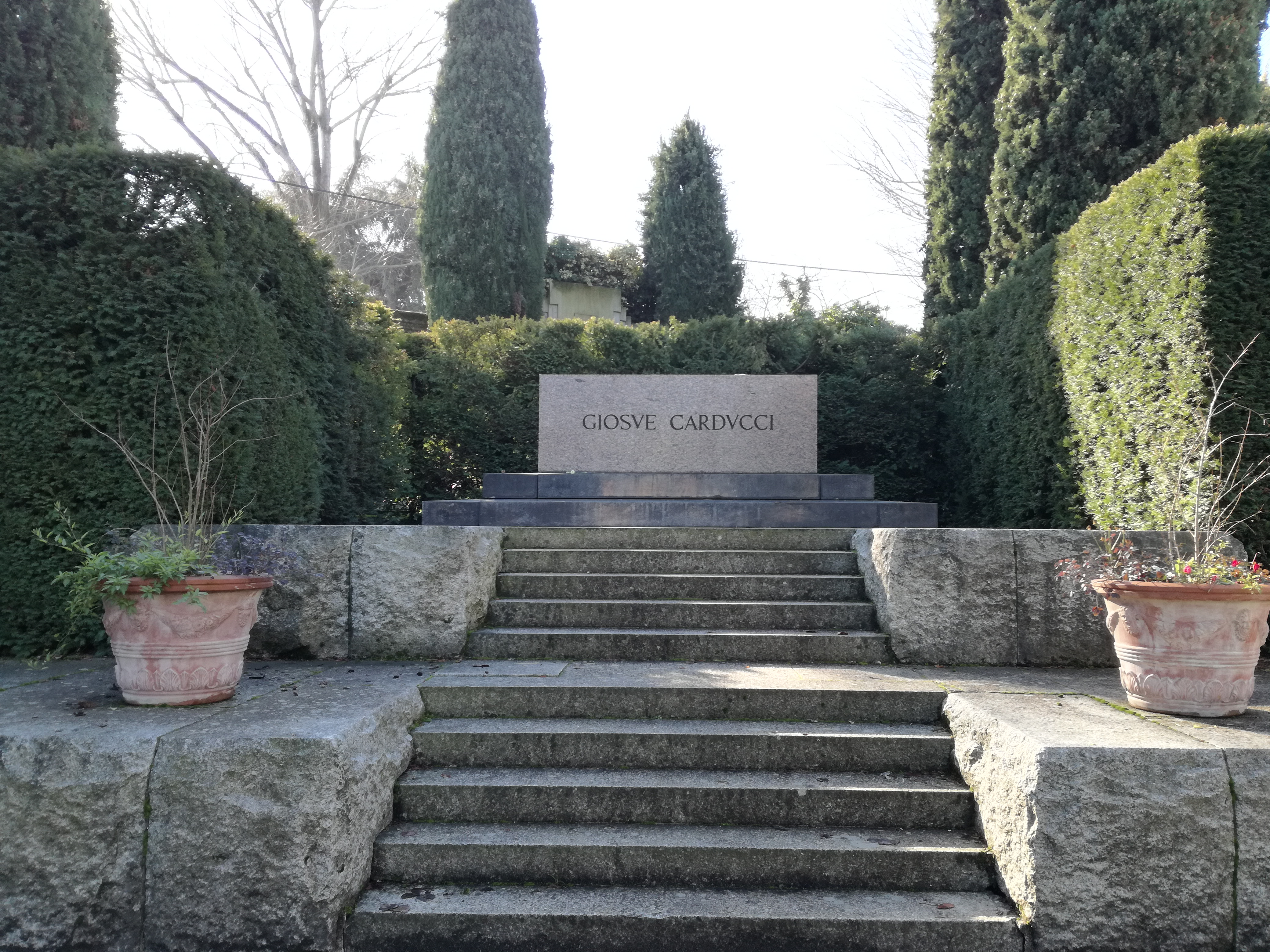 Grabstein des Literaturnobelpreisträgers Carducci auf dem Zentralfriedhof von Bologna